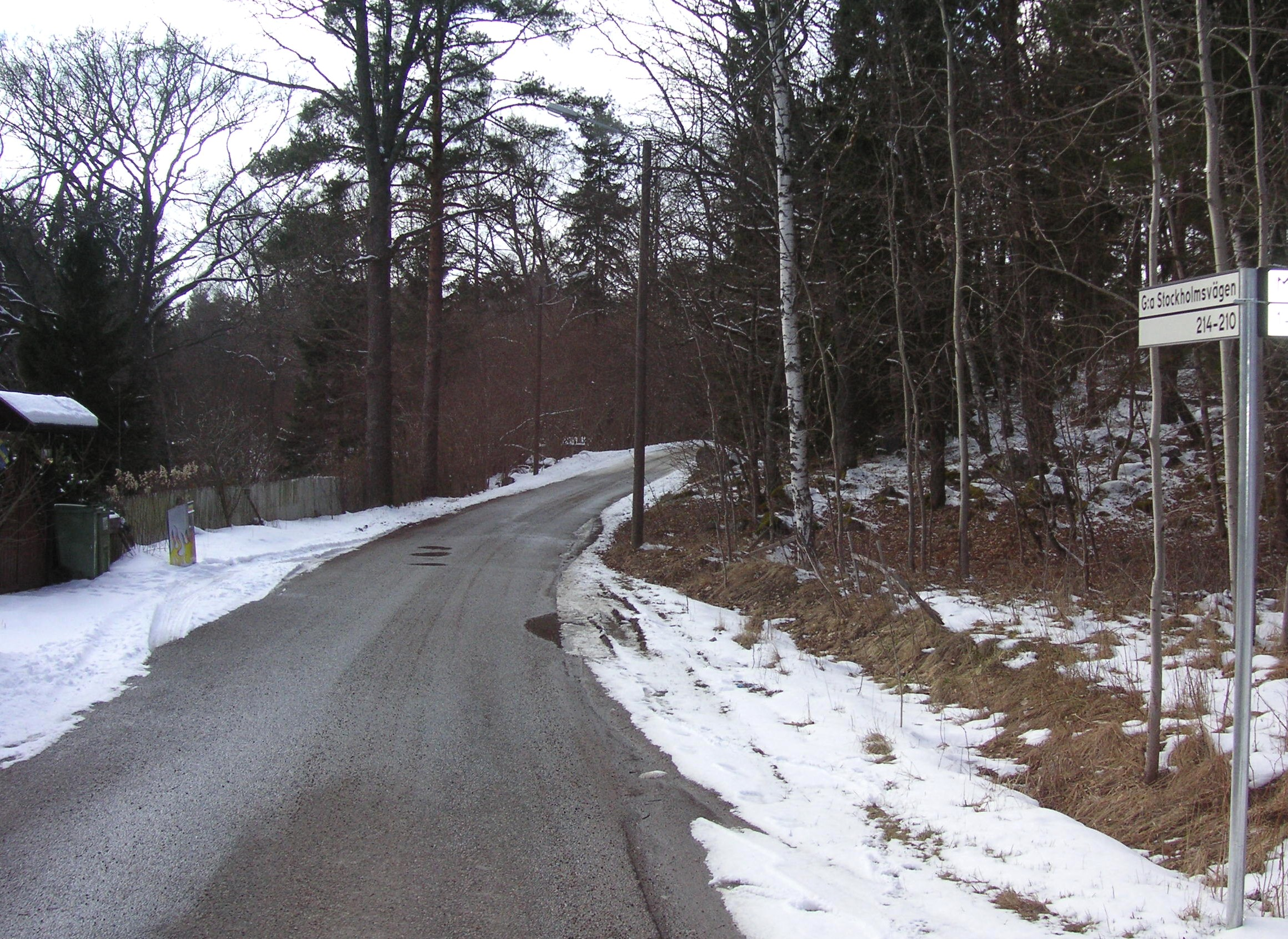 Gamla Stockholmsvägen i Huddinge